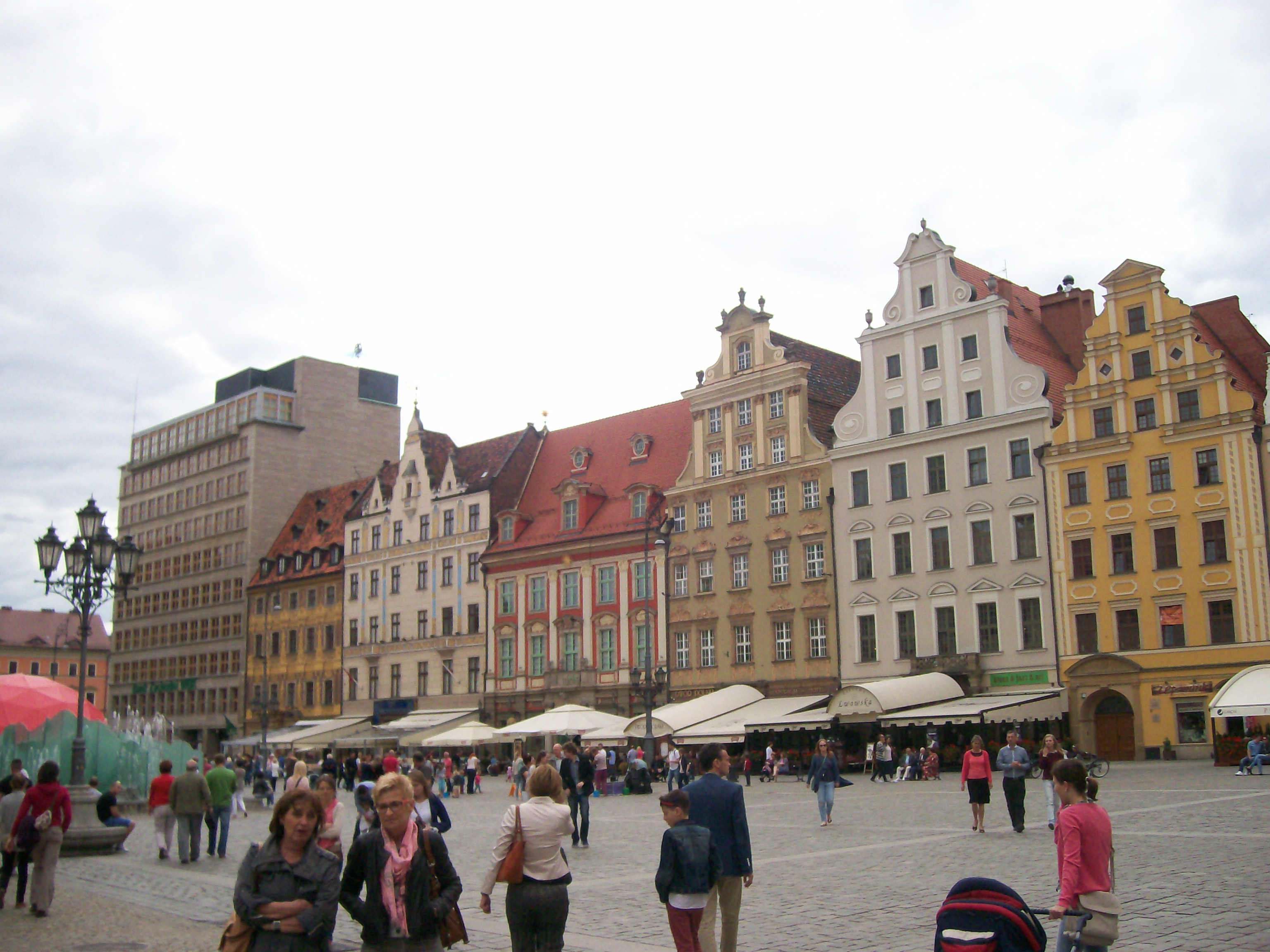 Rynek we Wrocławiu, 2014